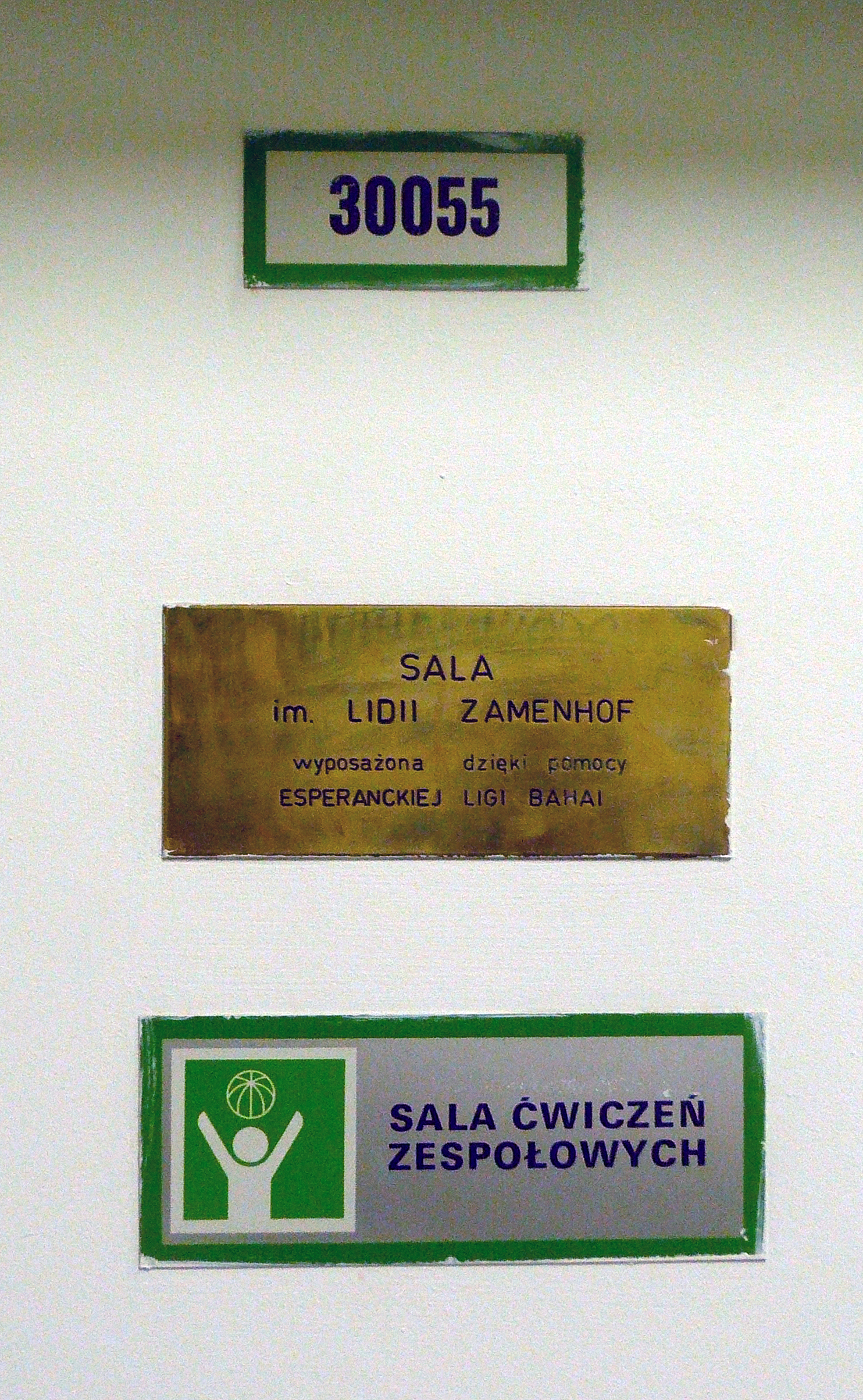 Tabuletoj sur la pordo de Salono Lidja Zamenhof, kies ekipaĵojn sponsoris Bahaa Esperanto-Ligo, en la Porinfana Hospitalo Ludoviko Zamenhof en Bjalistoko